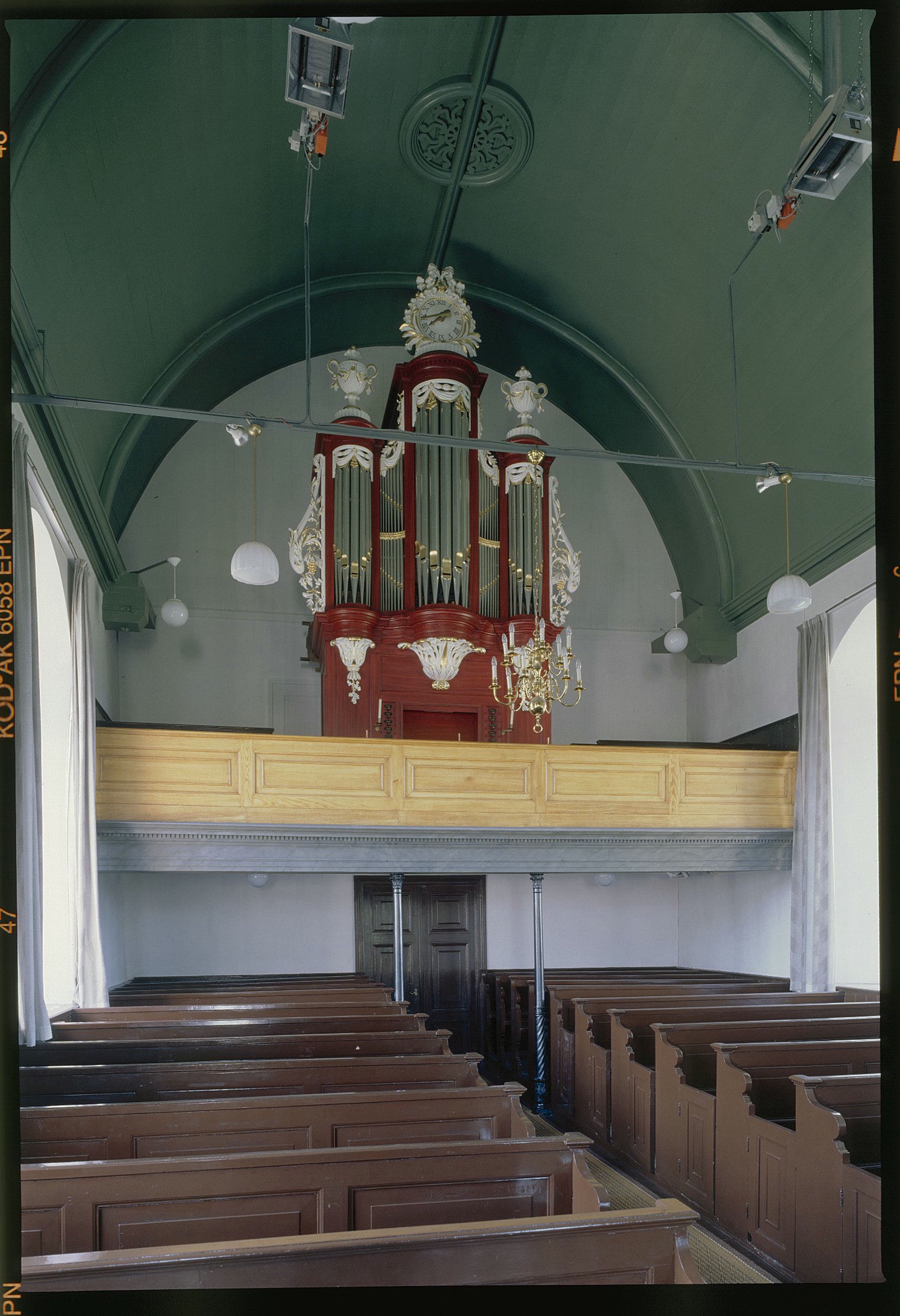 Nederlands Hervormde Kerk: Interieur, aanzicht orgel, orgelnummer 983 (opmerking: Gefotografeerd voor Het Historische Orgel in Nederland 1790-1818)